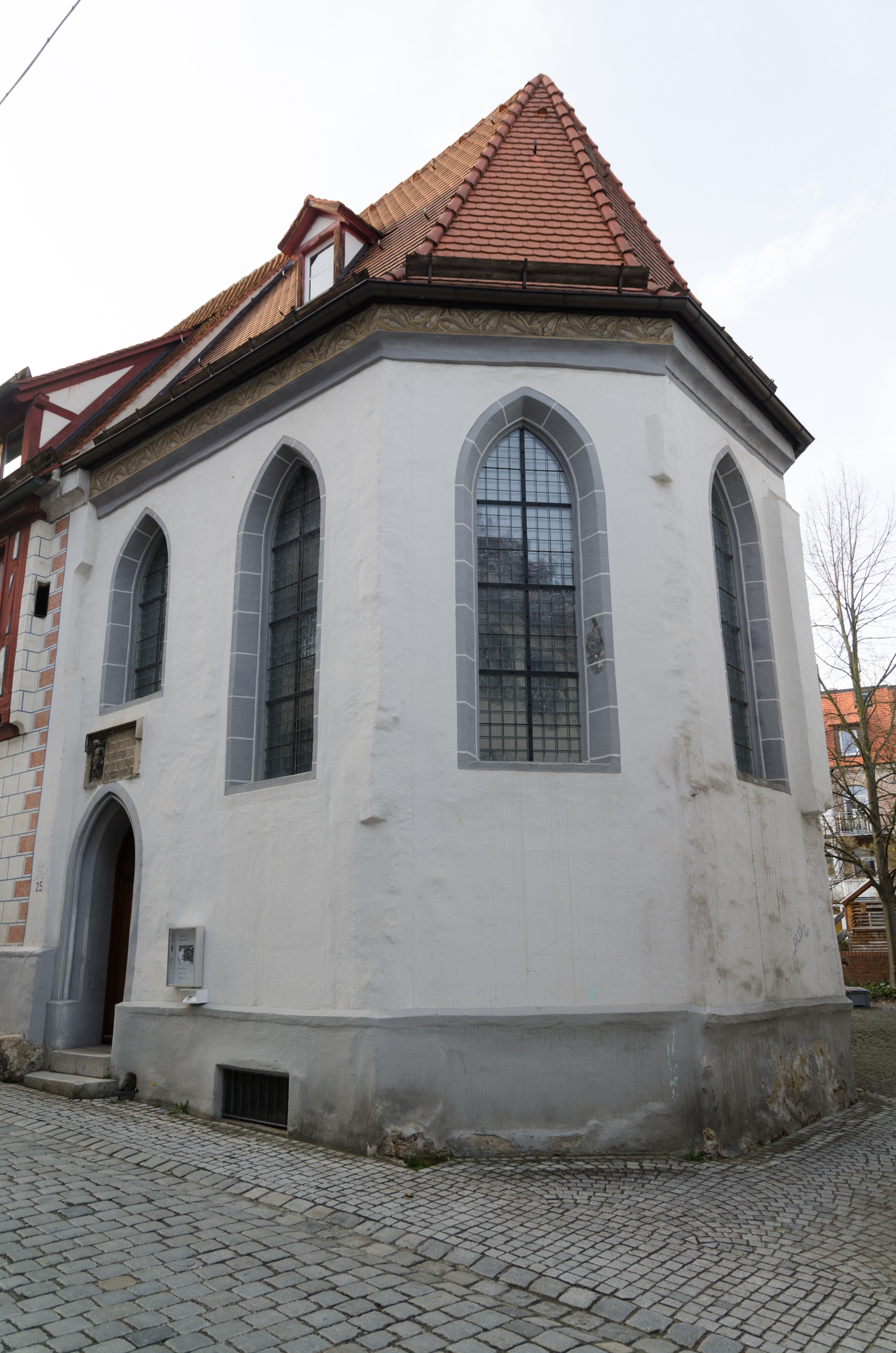 Kulturdenkmal Sebastianskapelle, Hahnengasse, Ulm